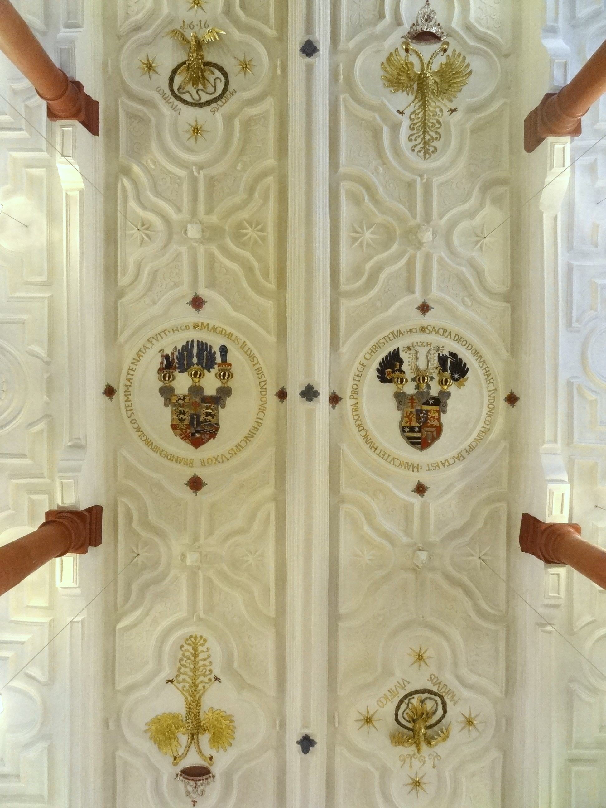 Stadtkirche zum Heiligen Geist (Nidda)